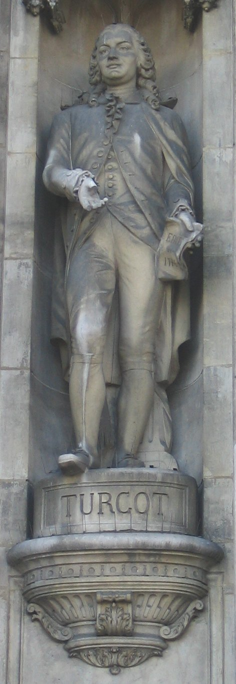 Estatua de Turgot (Ayuntamiento de París) Turgot, French politician (18th century). Statue in the Hôtel de Ville of Paris. Photo taken by Thierry Bezecourt in Jan. 2006. Sculptor : Alexandre-Joseph Oliva